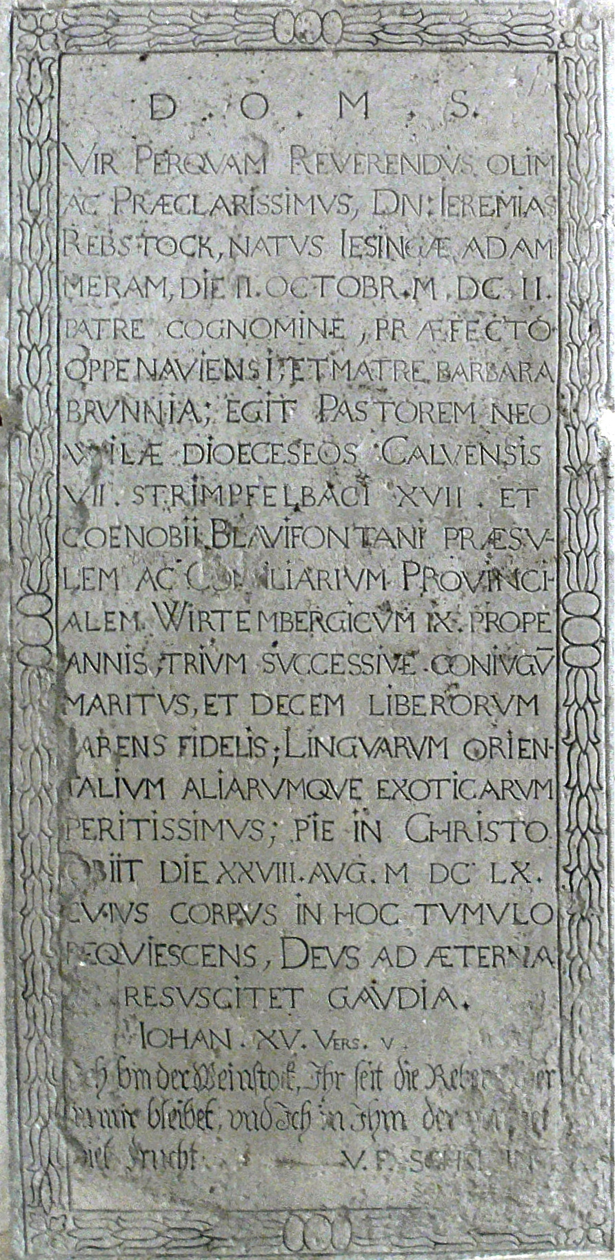 Kloster Blaubeuren Kloster Blaubeuren, Kapitelsaal: Epitaph Jeremias Rebstock (1651-1660)